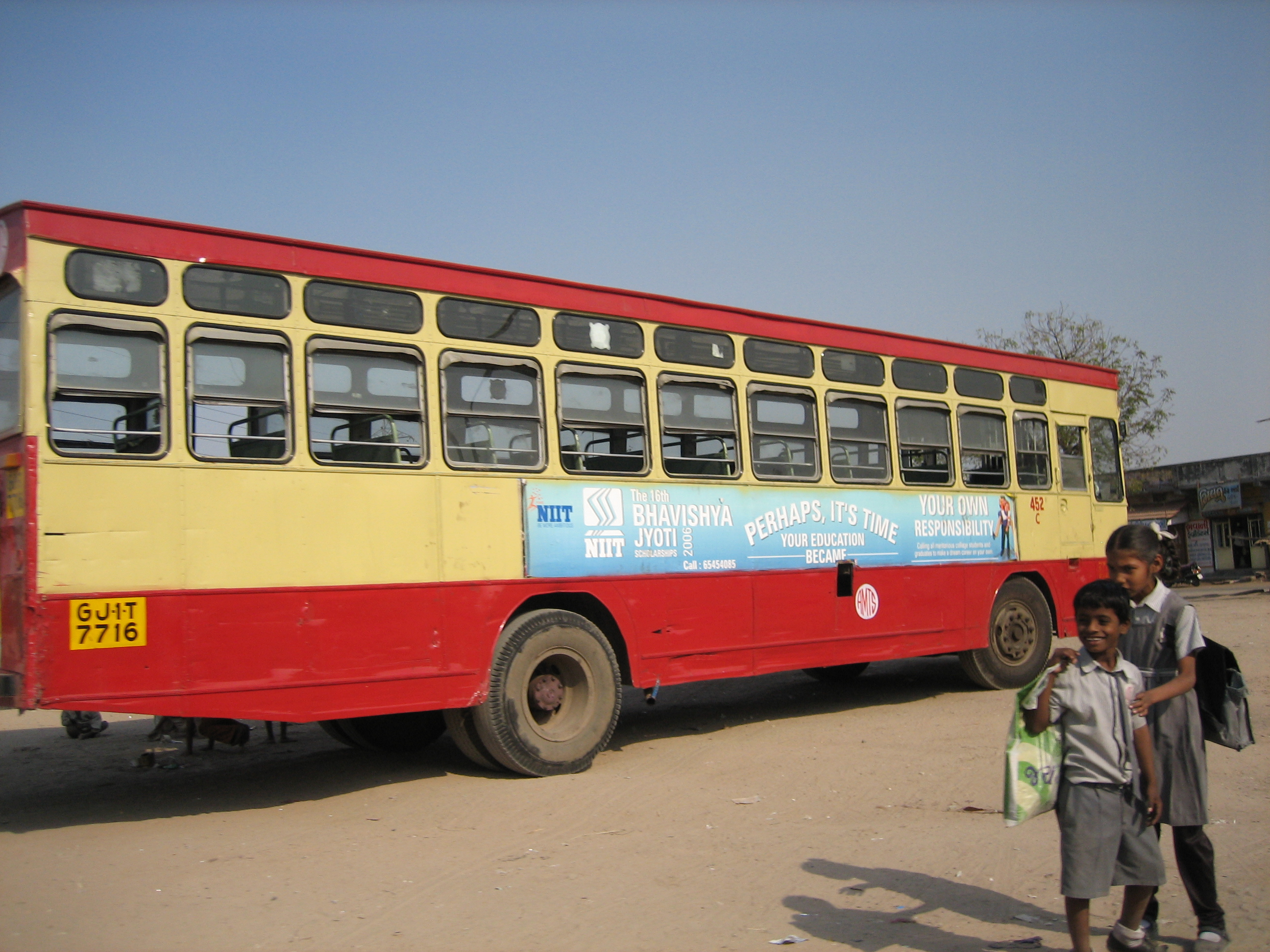 Ahmedabad 2007